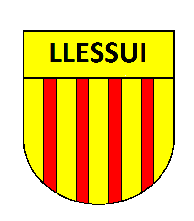 Escut antic de Llessui (Sort, Pallars Sobirà)